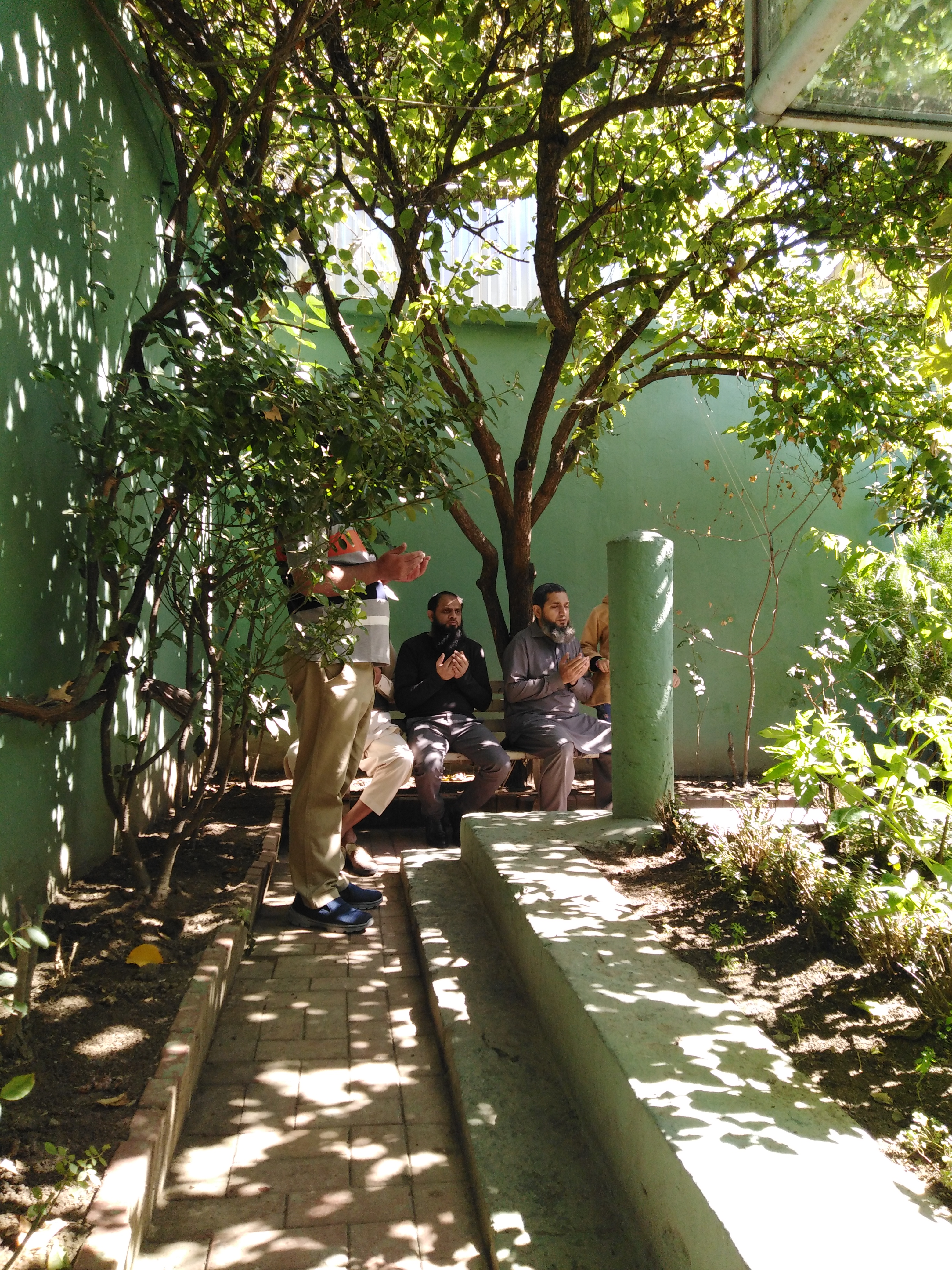 قبر حضرت ابو دردہ رضی اللہ عنہ